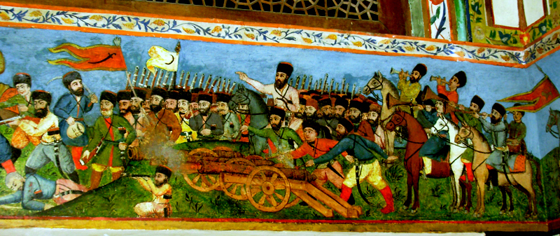 Роспись во Дворце Шекинских Ханов, XVIII в., Шеки, Азербайджан